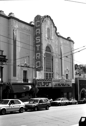 Le cinéma Castro Theater, sur Castro Street à San Francisco. Photo : Howie Berlin.